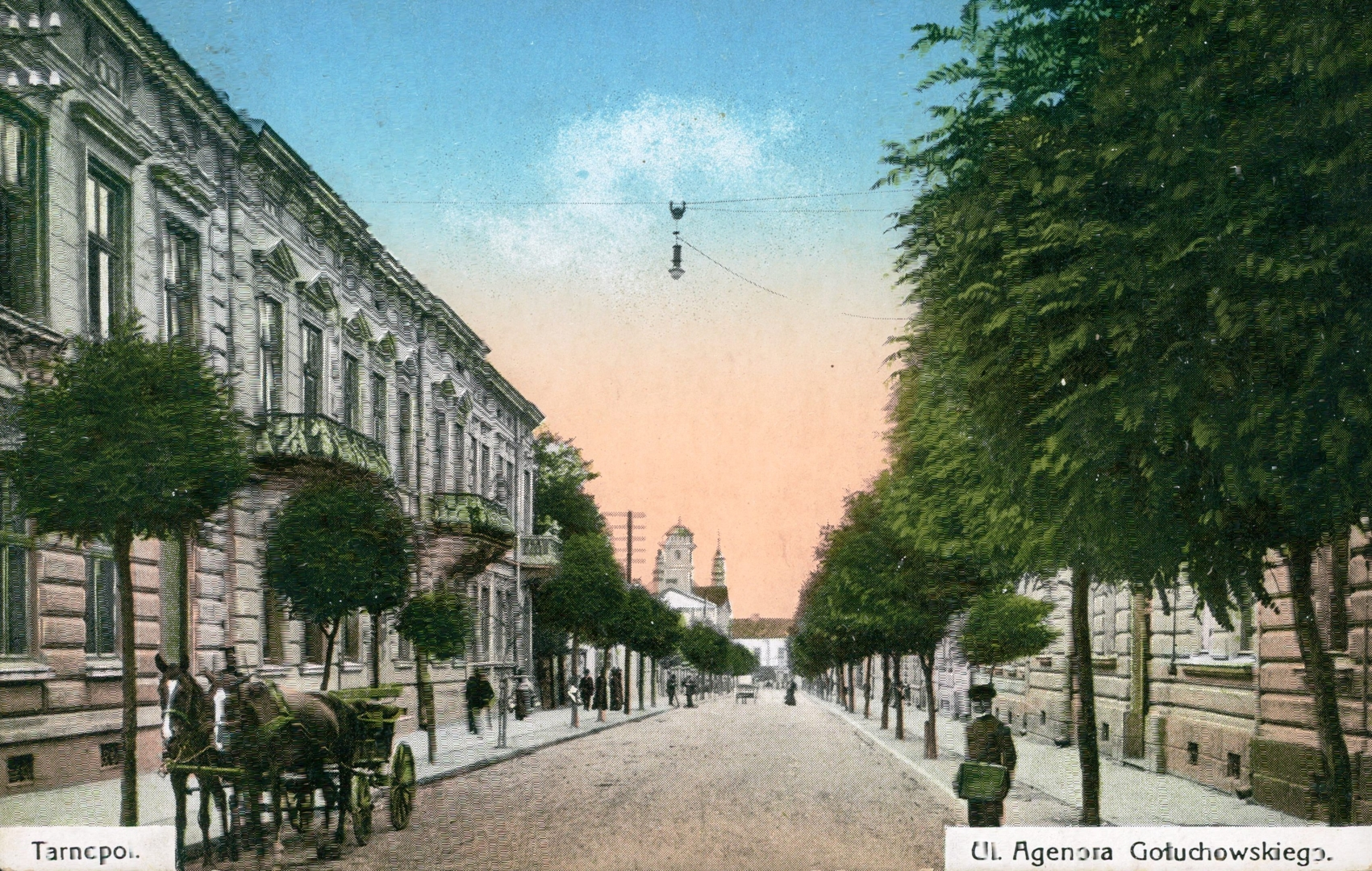 вулиця Чорновола (Аґенора Ґолуховского), Тернопіль, до московитсько-більшовицької окупації